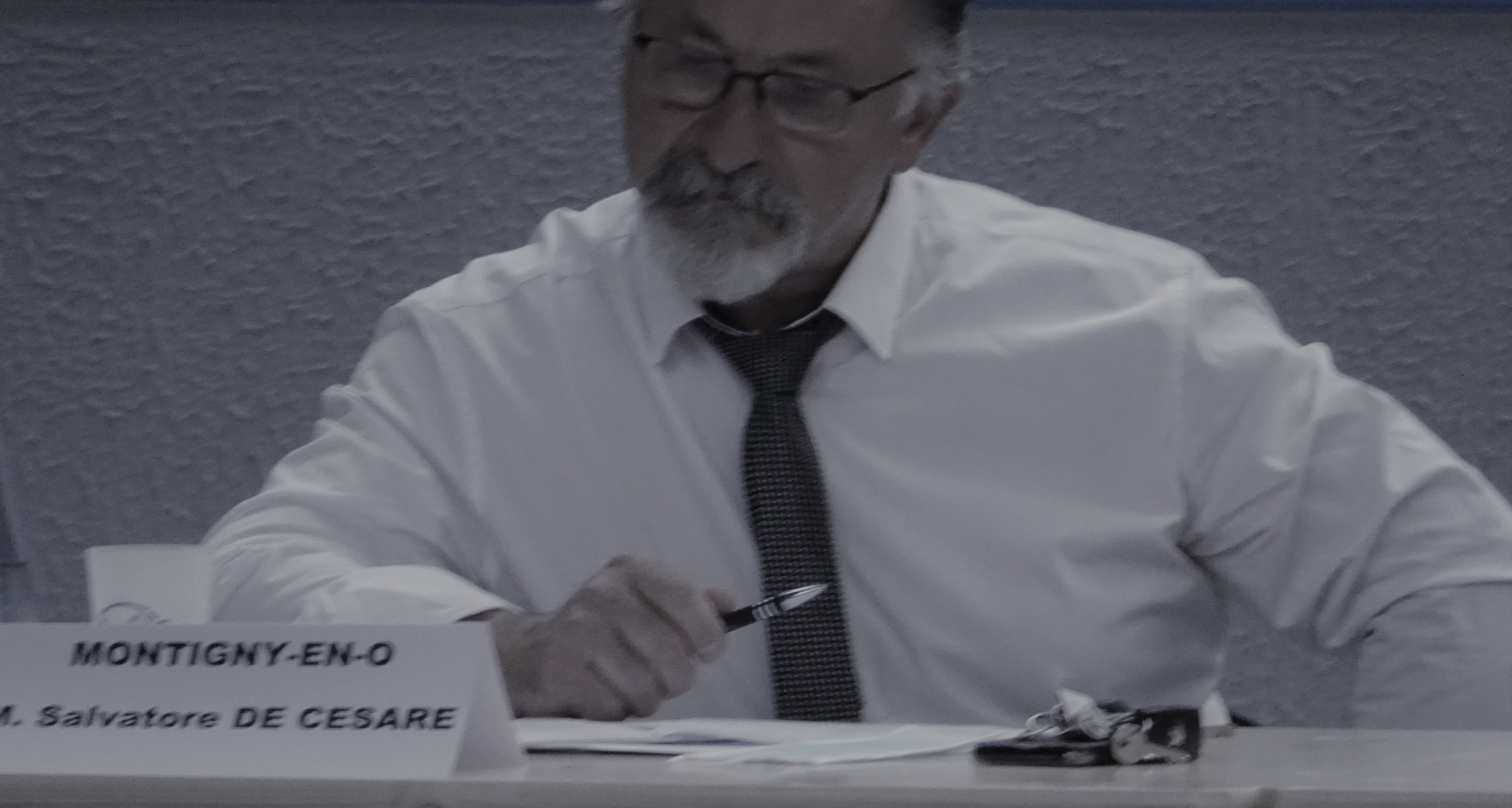 Salvatore De Cesare, maire de Montigny-en-Ostrevent lors de la séance d'investiture de la Communauté de communes Coeur d'Ostrevent en la salle Coquelet d'Auberchicourt le 10 juillet 2020